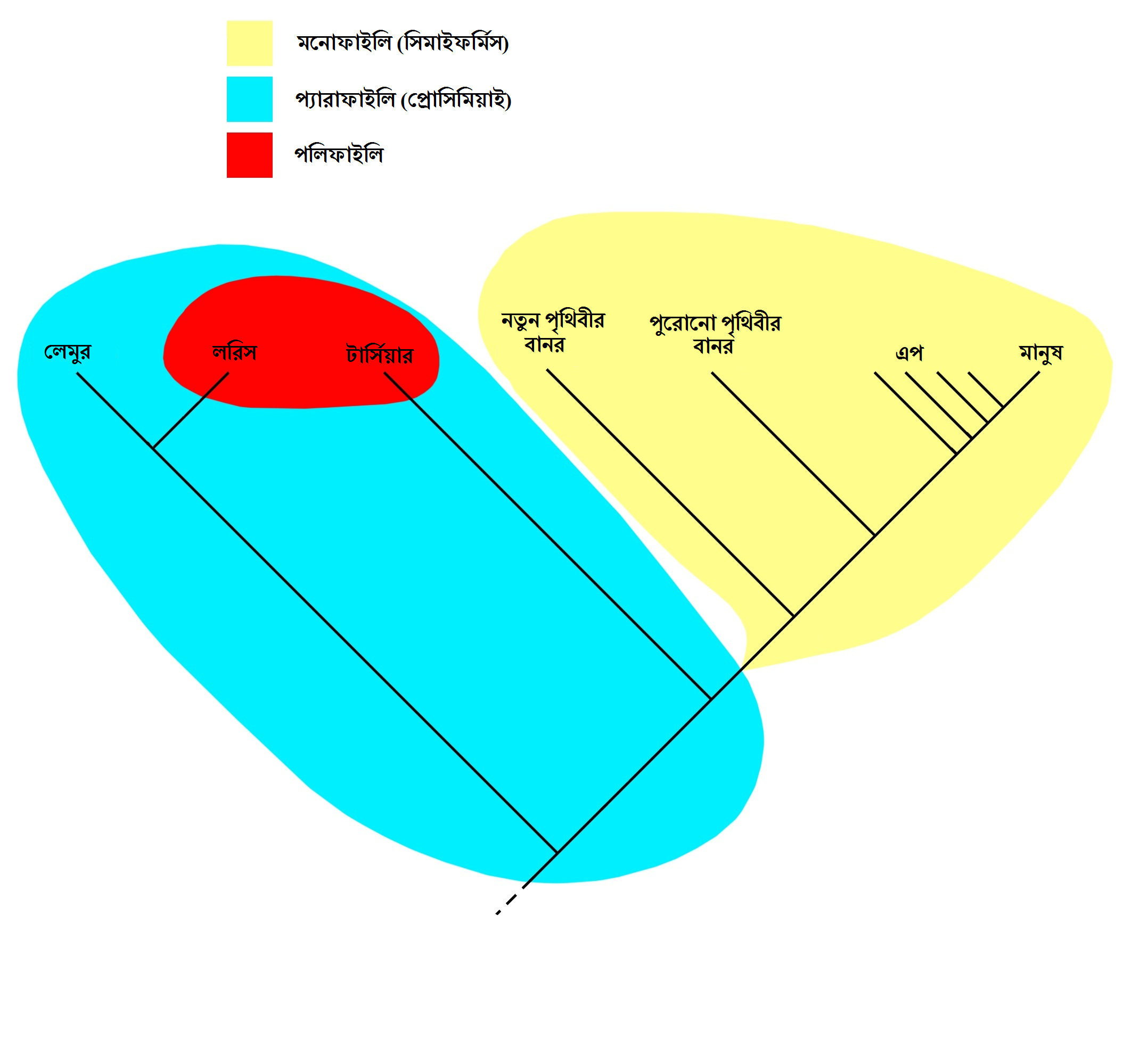 প্রাইমেটদের মধ্যে মনোফাইলি, প্যারাফাইলি ও পলিফাইলির রেখাচিত্র। প্রদত্ত পলিফাইলির শর্ত হল "নিশাচর প্রাইমেট" (লরিস এবং টার্সিয়ার)।